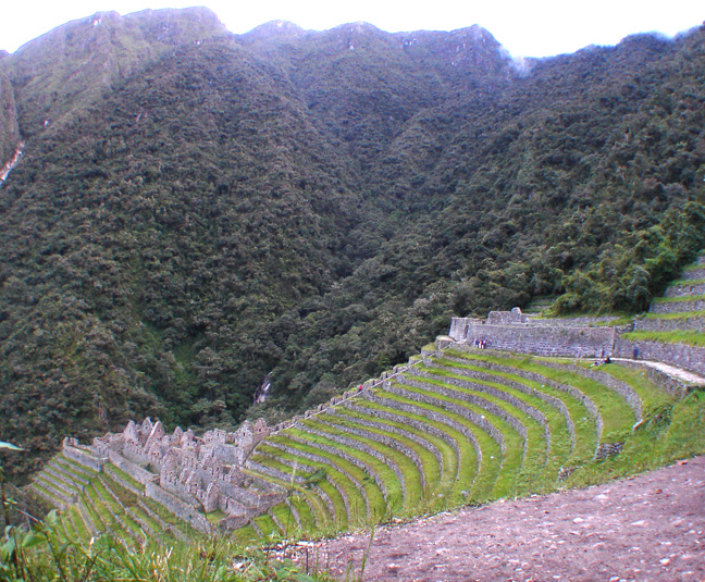 Wiñay Wayna Peru